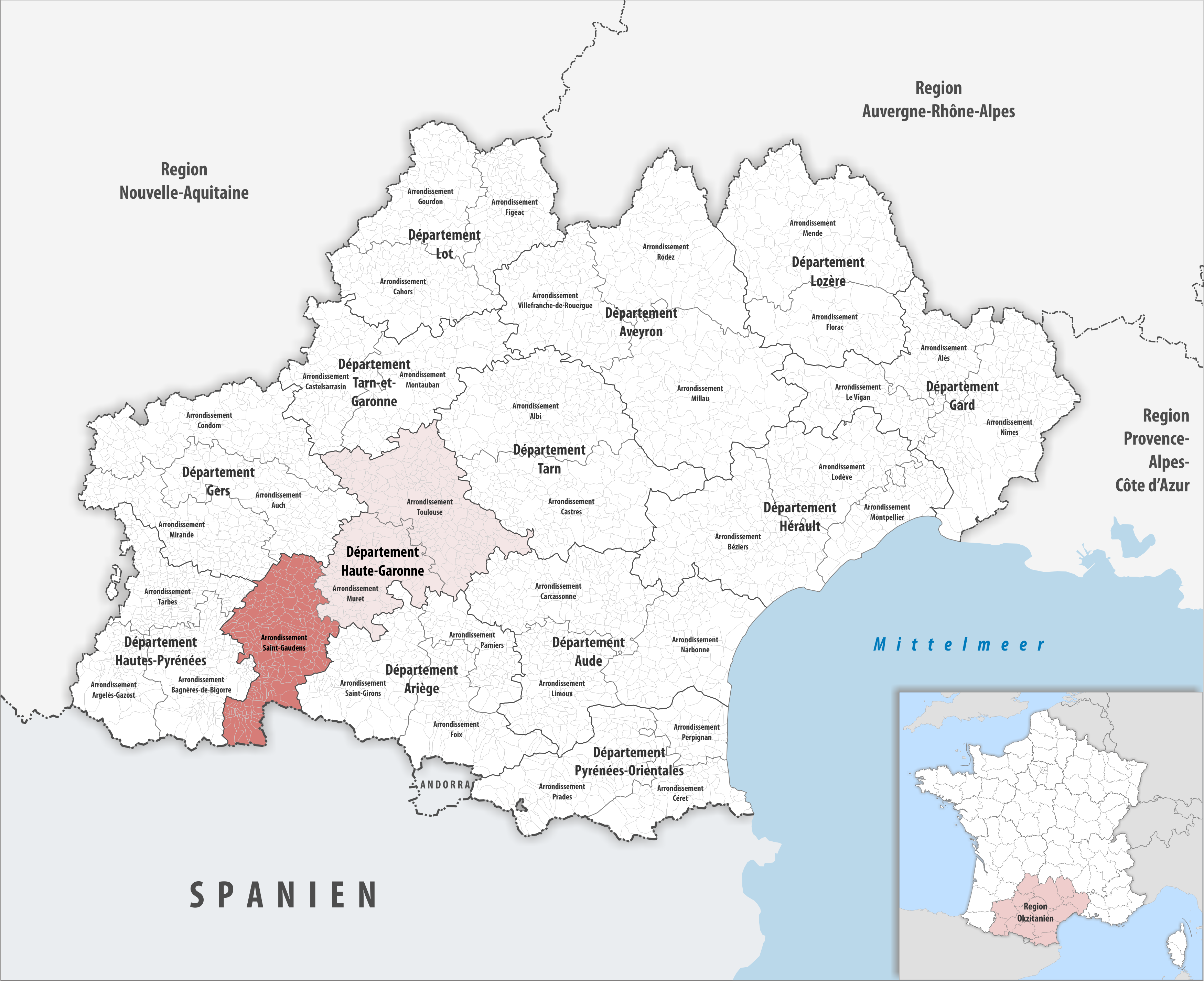 Lage des Arrondissements Saint-Gaudens